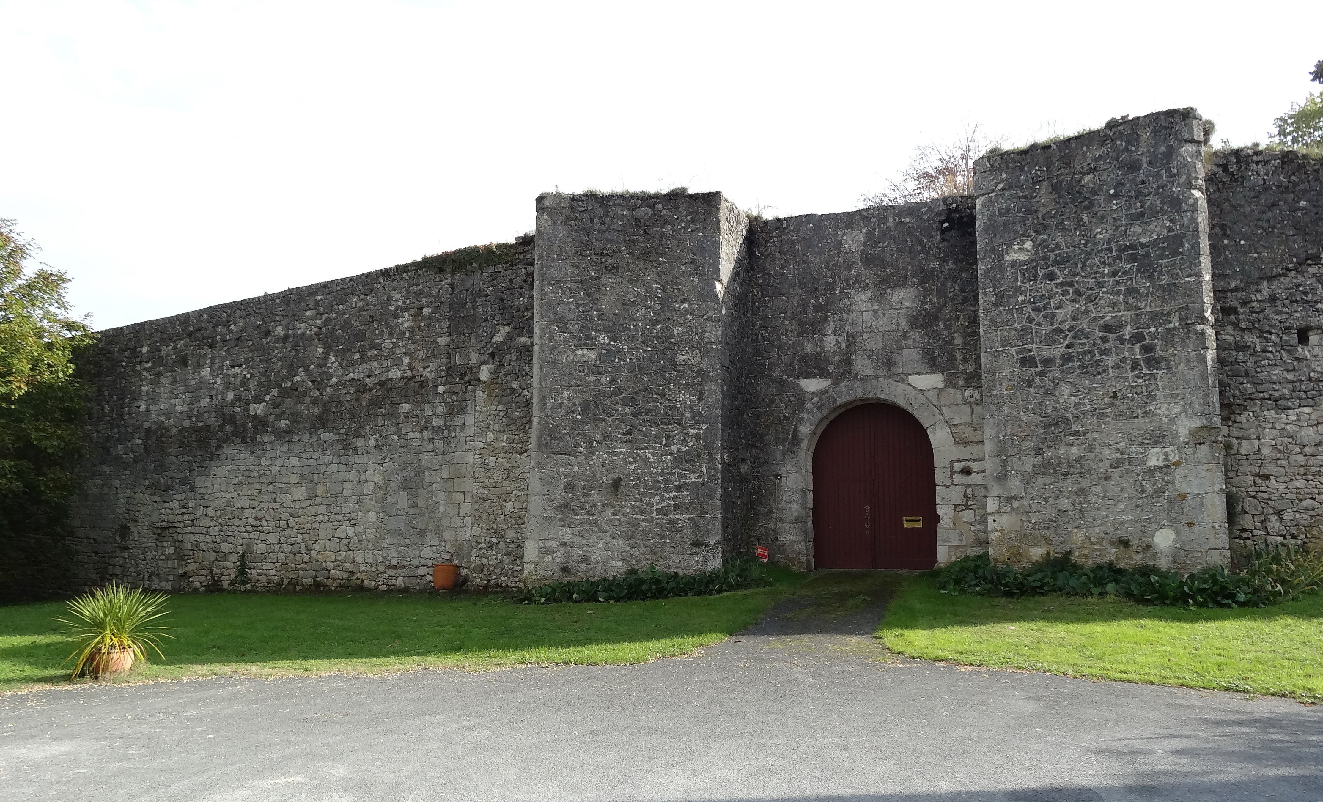 Le château de Puyguilhem à Thénac (Dordogne)